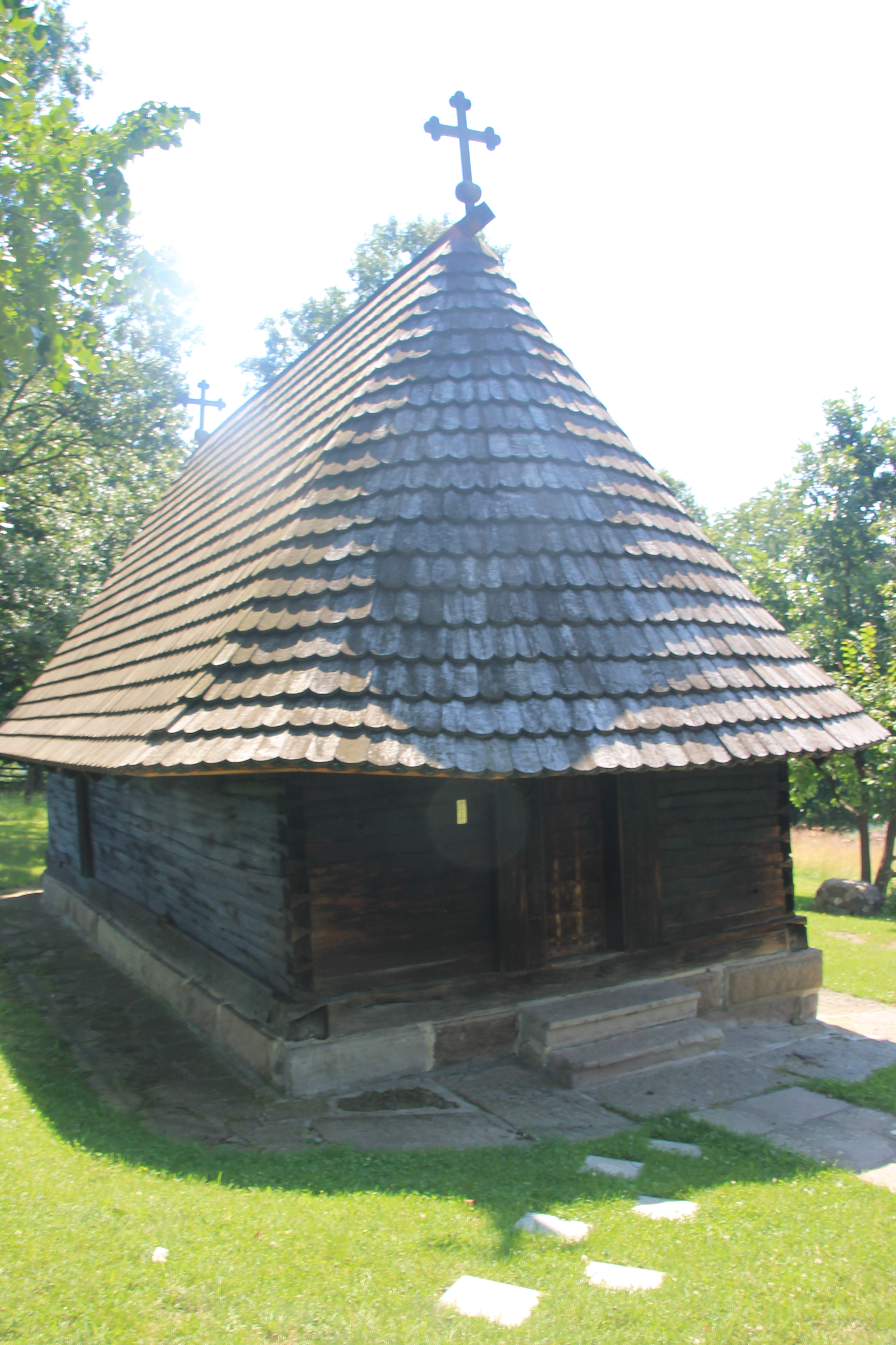 Crkva brvnara u Takovu